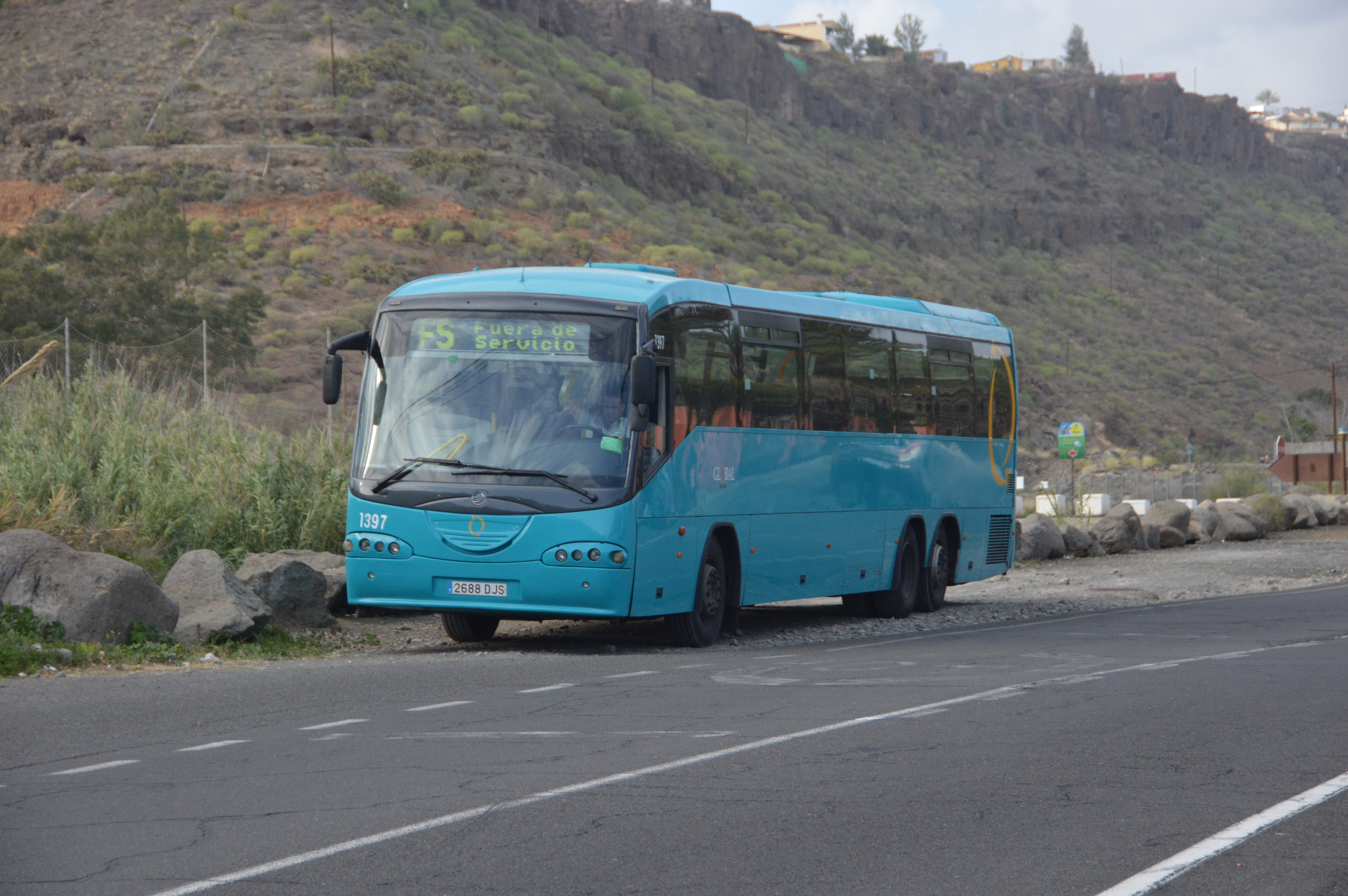 Description